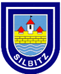 Das Wappen zeigt das ehemalige Rittergut des Dorfes. Die Strömung im Bild darunter, symbolisiert die Weiße Elster, an dessen Ufern, Silbitz enstanden ist. Auffälig ist auch die rundum Blaue Farbgebung des Wappens, die vom Autor aber ganz bewusst gewählt wurden ist, da diese eine Charakterisierung unseres Dorfes ist.